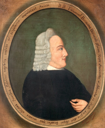 Manuel de Bernardo Alvarez